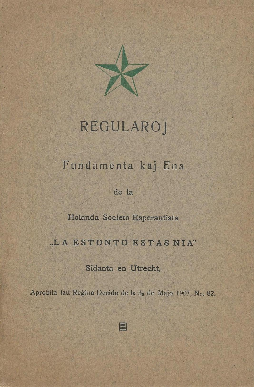 librokovrilo de libro "Regularoj de LEEN", 1907